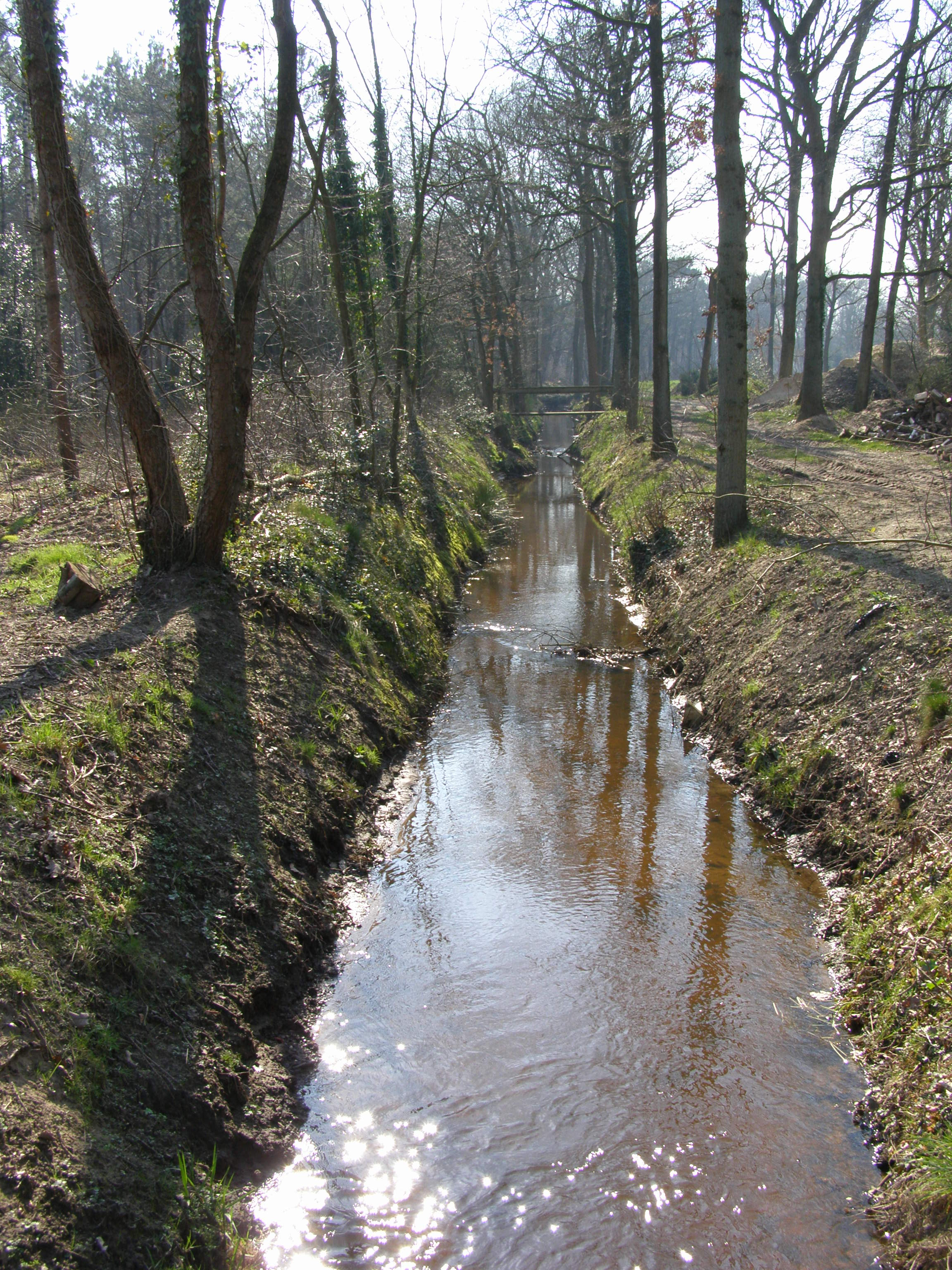 eigen werk